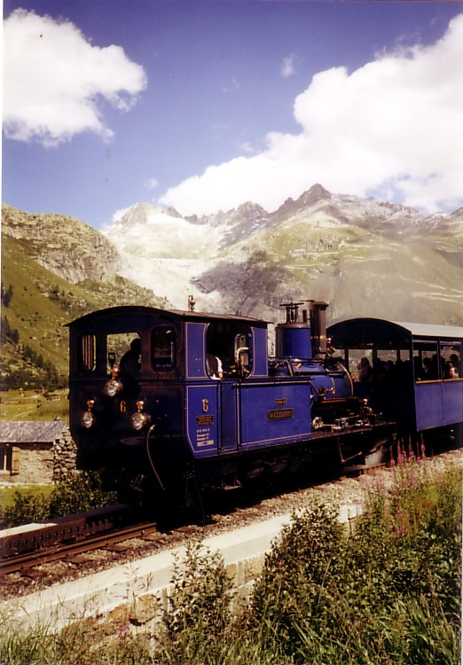 Die Lok 6 Weisshorn der Dampfbahn Furka-Bergstrecke (Meterspur Adhäsions- und Zahnradbahn), kurz vor der Station Gletsch 1762m, im August 2004.